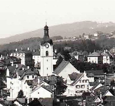 Blick von Westen auf die alte Katholische Kirche (abgebrochen 1936) St. Martin in Bruggen (St. Gallen)